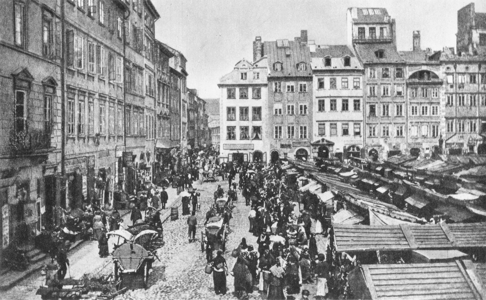 Rynek Starego Miasta w Warszawie, po lewej: Strona Kołłątaja, w tle: Strona Dekerta, zwana dawniej "miejską"